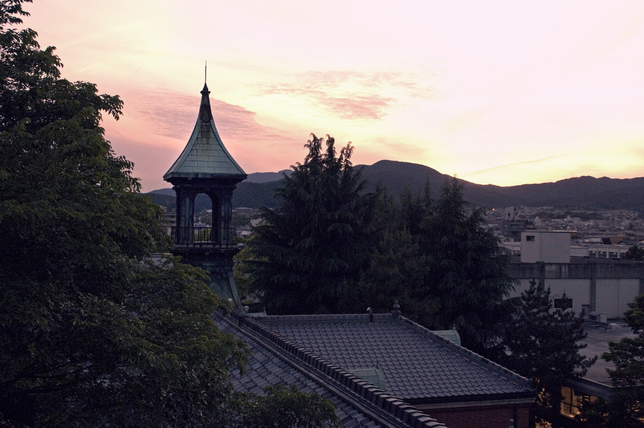 夕日の尋源館